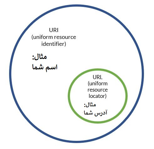 تفاوت بین URI و URL.